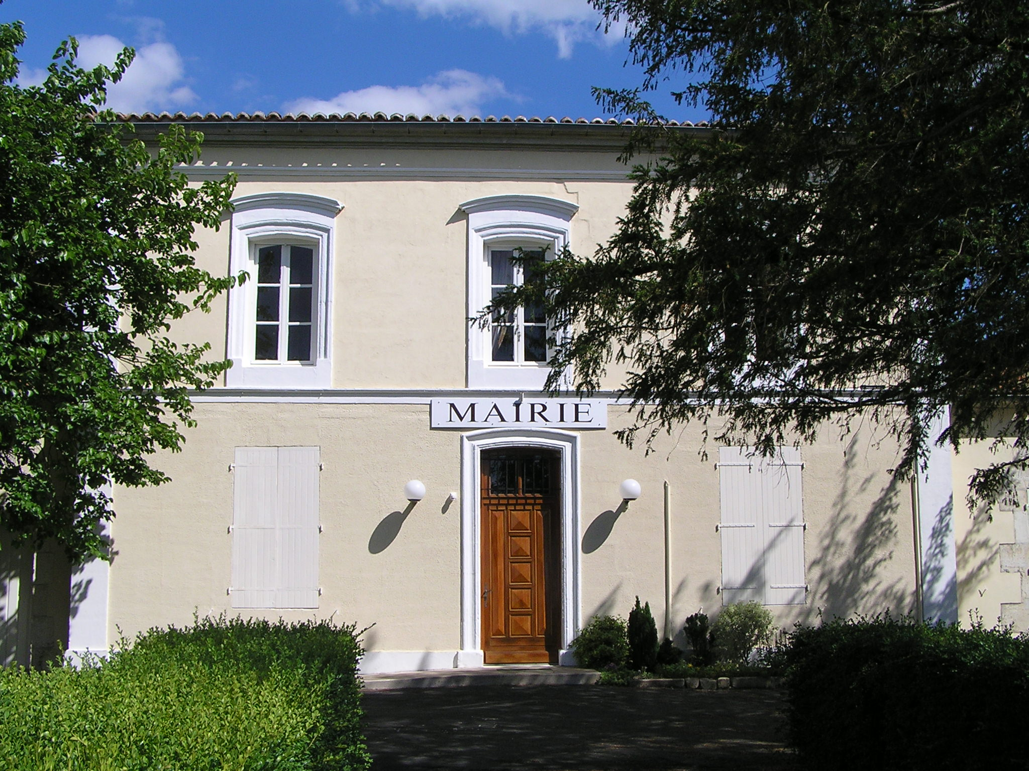 mairie de Mons